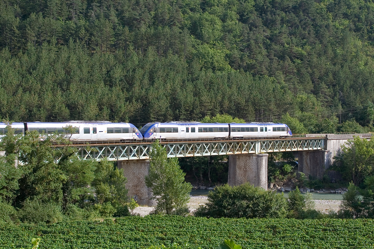 Viaduc de Vercheny (France - Drôme) - Ligne de Livron à Aspres-sur-Buëch - Communes de Vercheny et d'Espenel